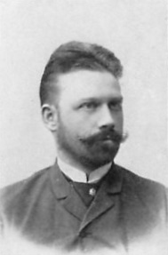 Józef Waśniewski, pola verkisto kaj esperantisto